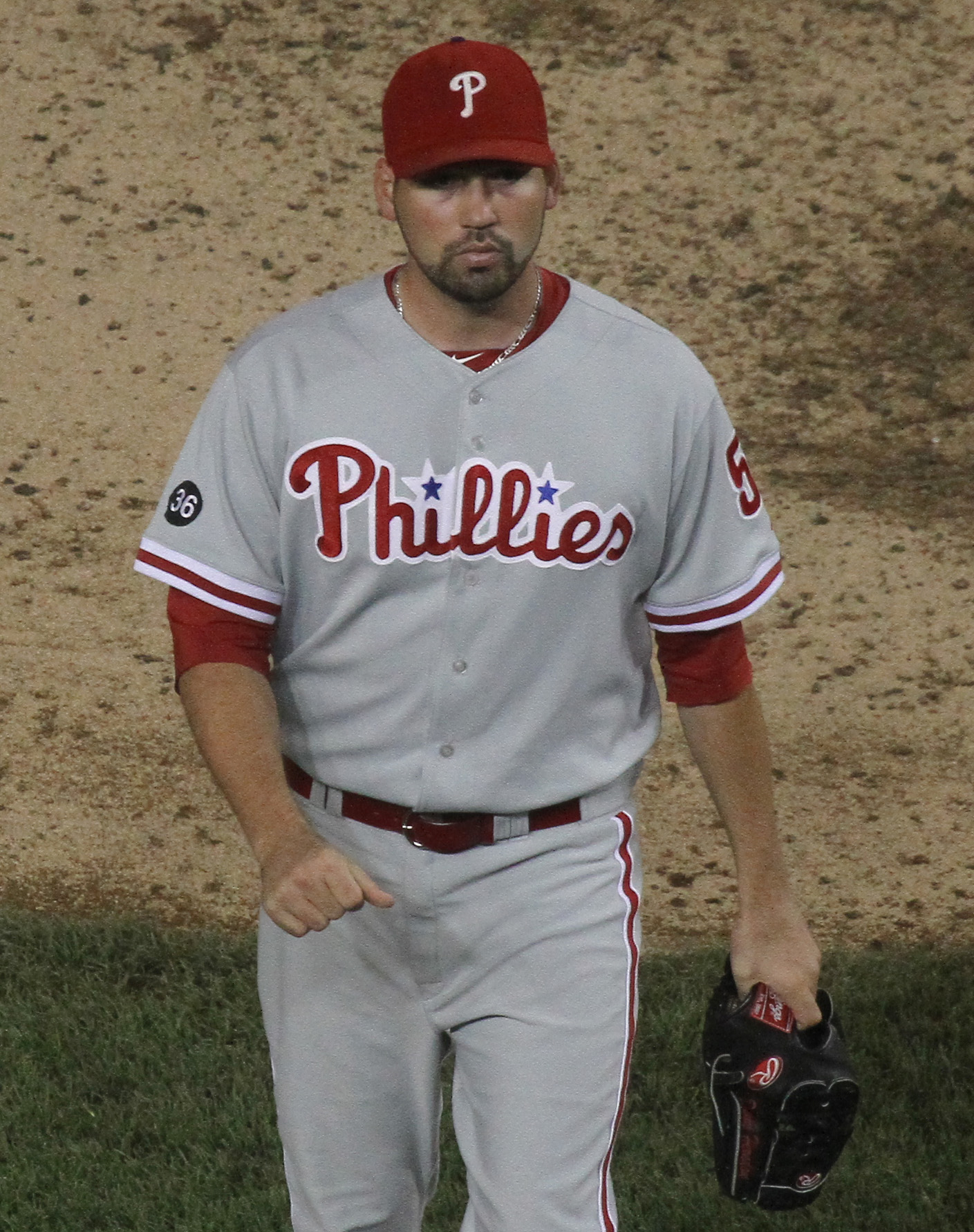 David Herndon